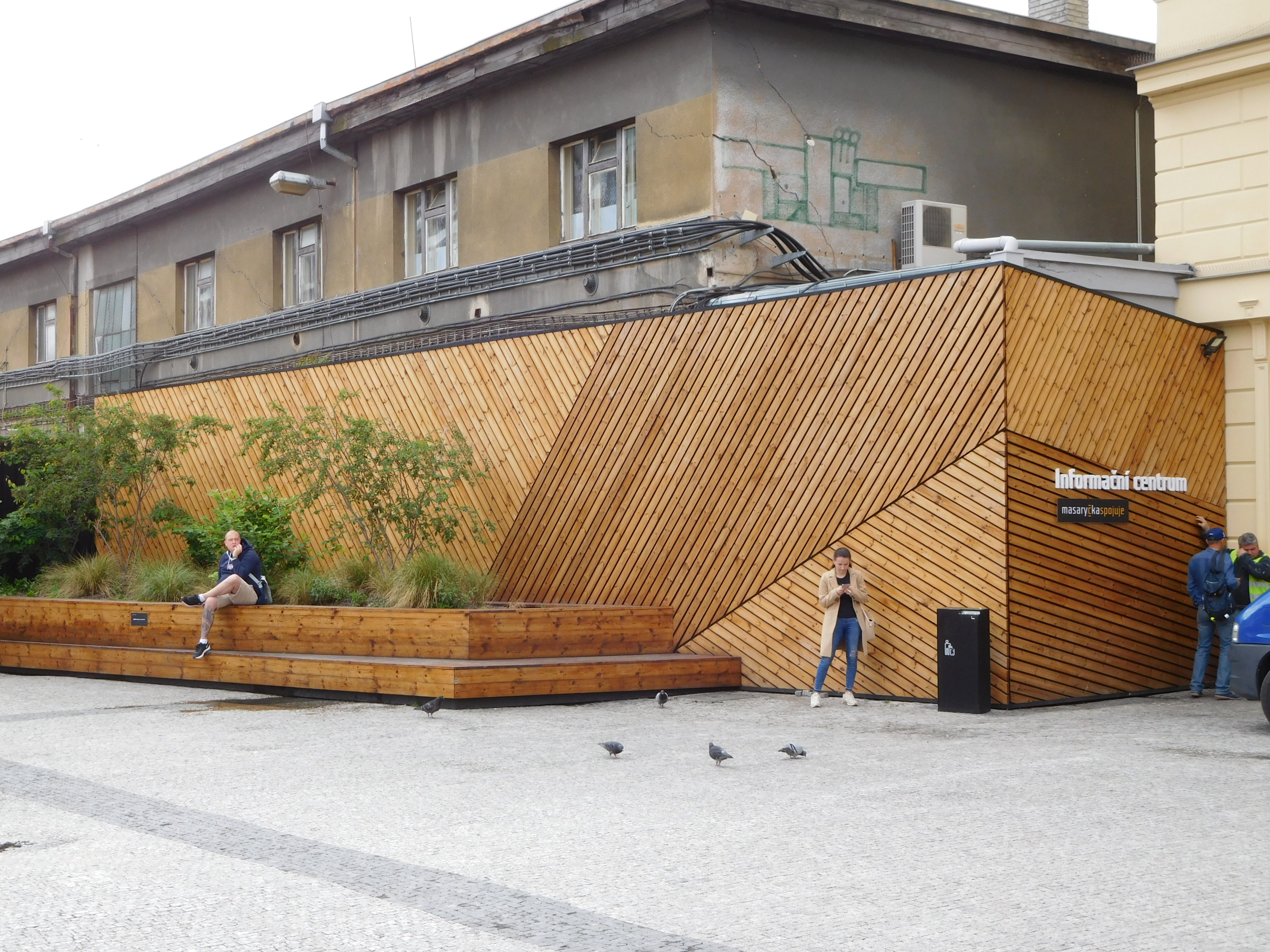 Praha - Nové Město, Na Florenci; Revitalizace Masarykova nádraží - infostánek "Masaryčka spojuje"